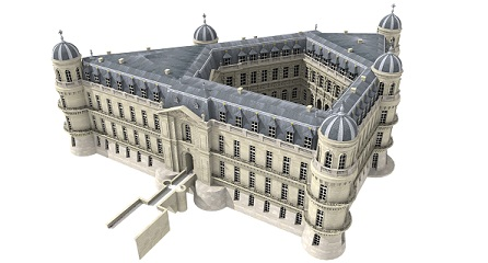 Le château de Chantilly au XVIIIème siècle en 3D